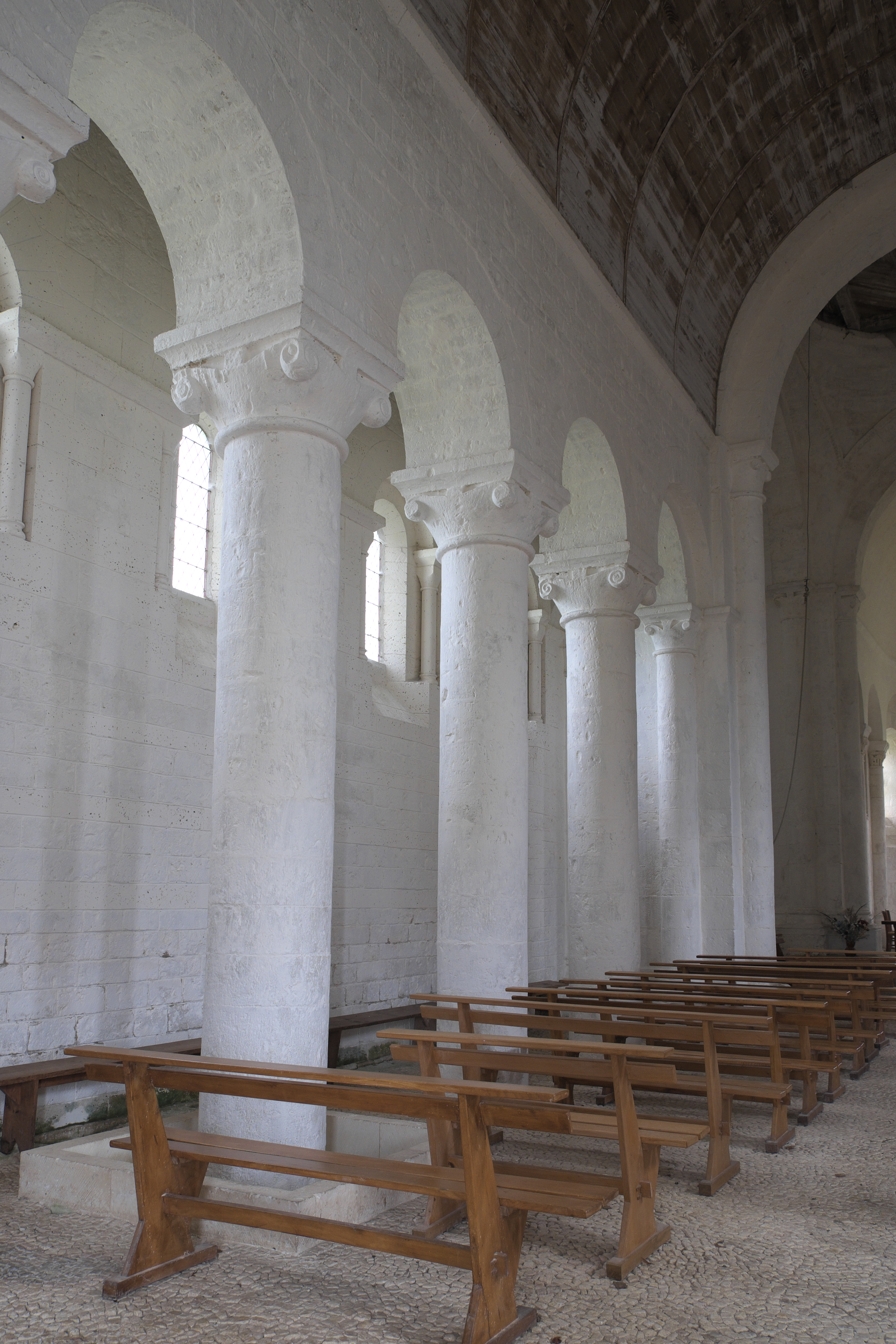 Katholische Kirche Saint-Denis in Lichères im Département Charente (Nouvelle-Aquitaine/Frankreich), Innenraum